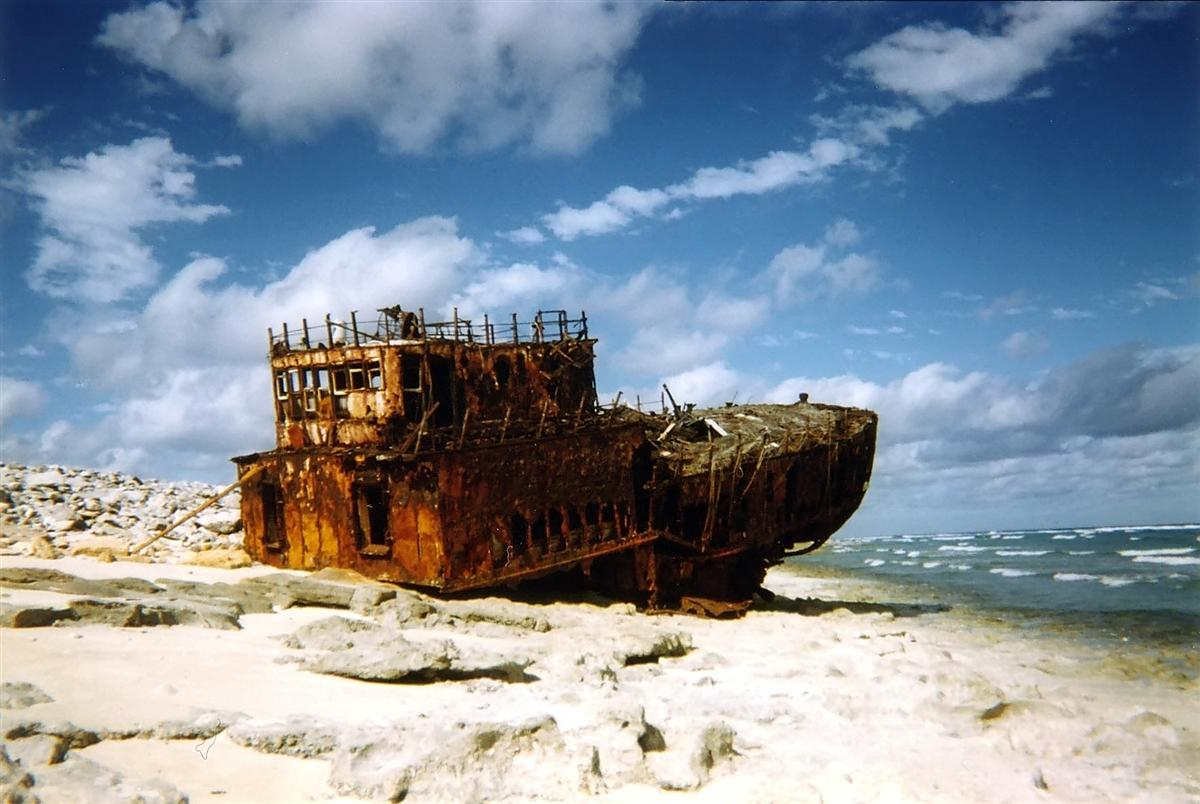 Épave du crevettier réunionnais Mahavel échoué en juillet 1976 sur l'île Europa